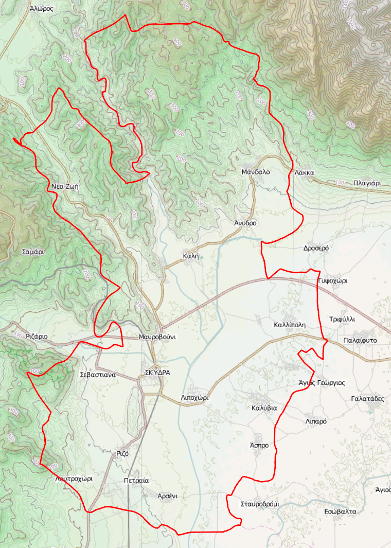 Τοπογραφικός χάρτης του Δήμου Σκύδρας